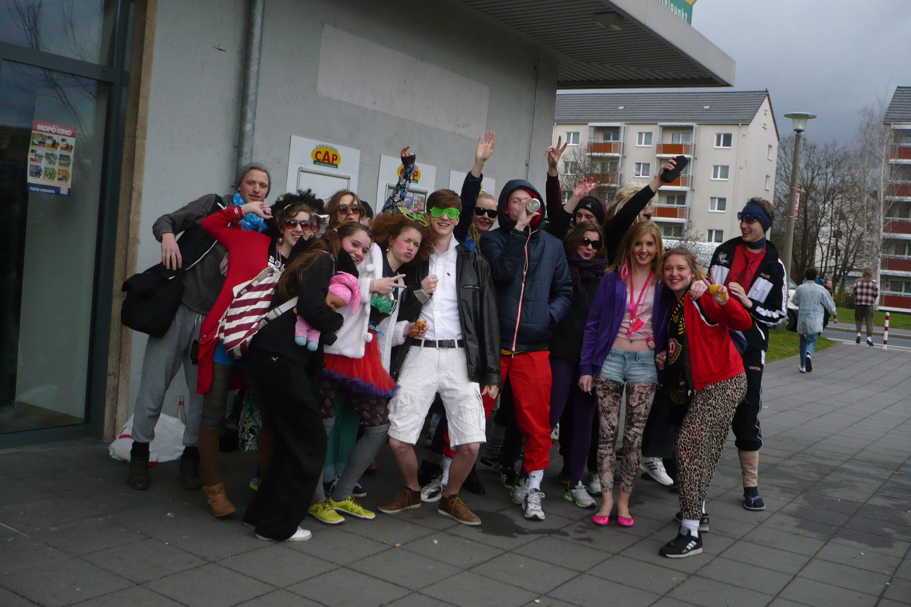 2015-04-01 Dresden Pirnaische Vorstadt